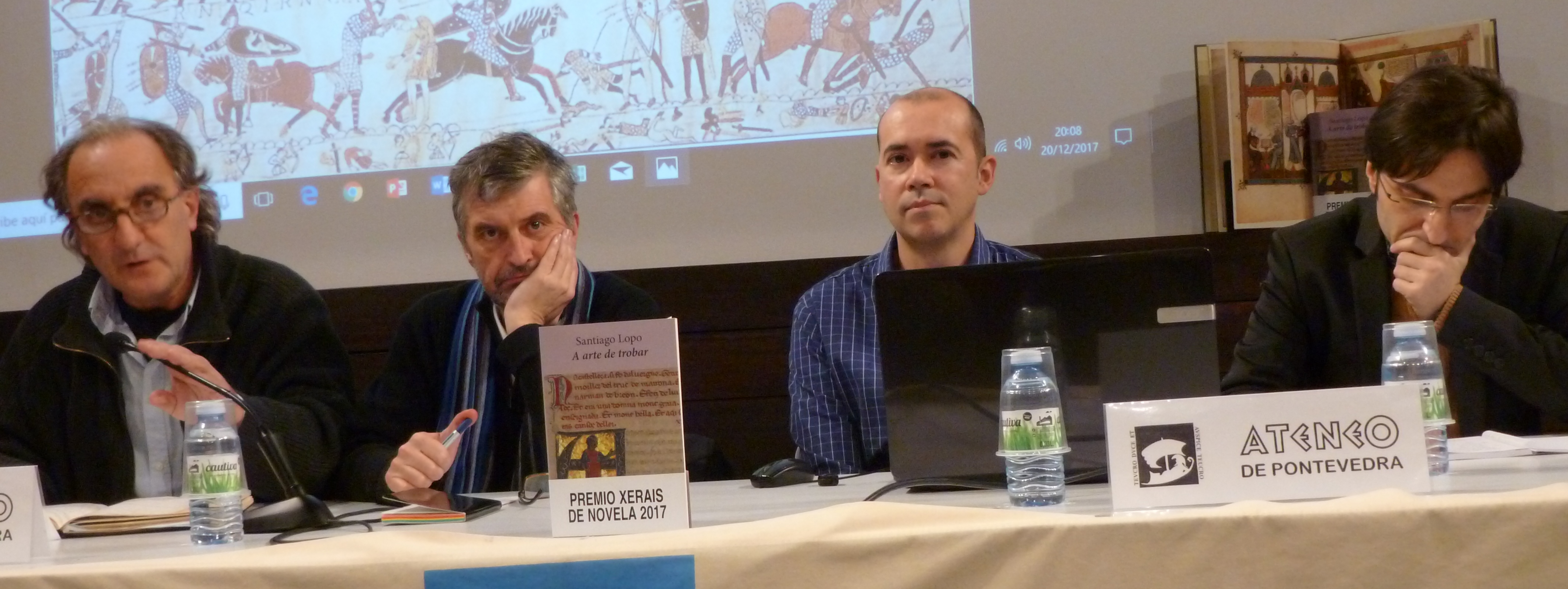 Presentación de "Arte de Trobar" de Santiago Lopo